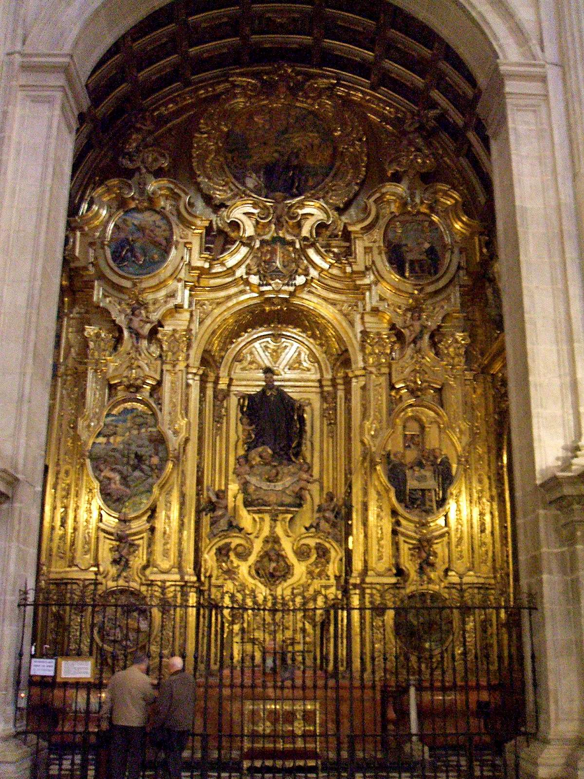 Capilla de san Benito, en la Catedral de Jaén.